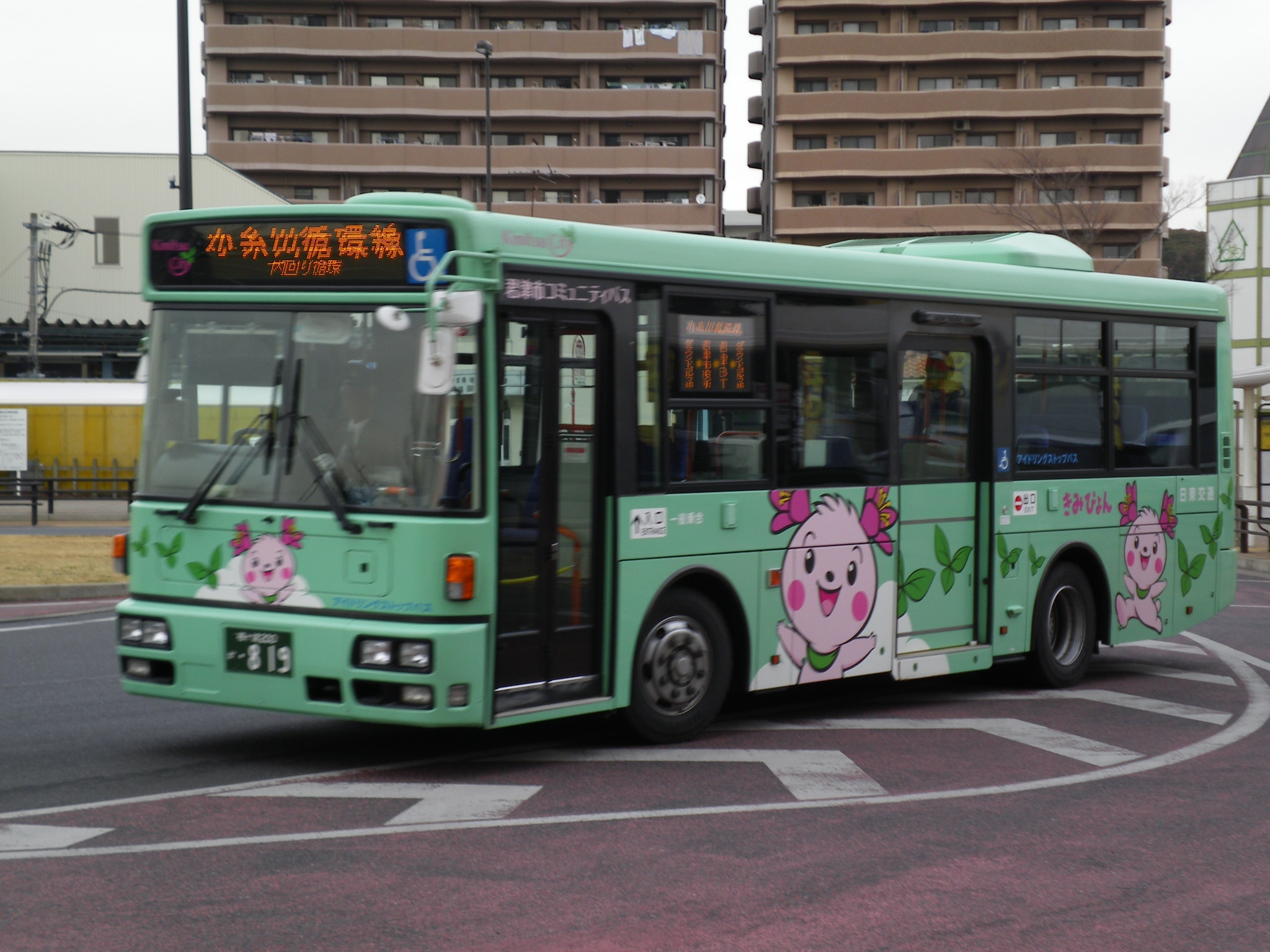 日産ディーゼル・スペースランナーRM 袖ヶ浦200か819 千葉県君津市・JR君津駅にて投稿者本人が撮影。